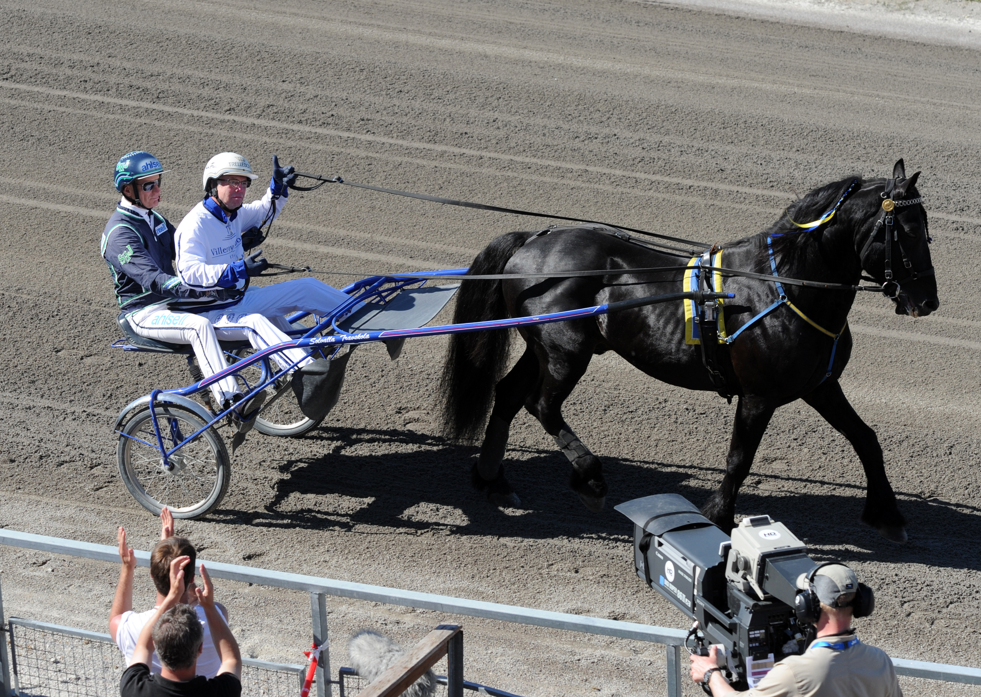 Jim Frick, Stig H. Johansson (till v.ä.) och Järvsöfaks defilerar inför Jim Fricks lopp/Elitkampen, under Elitloppshelgen på Solvalla. Samtliga tre är hedersambassadörer för svensk travsport.